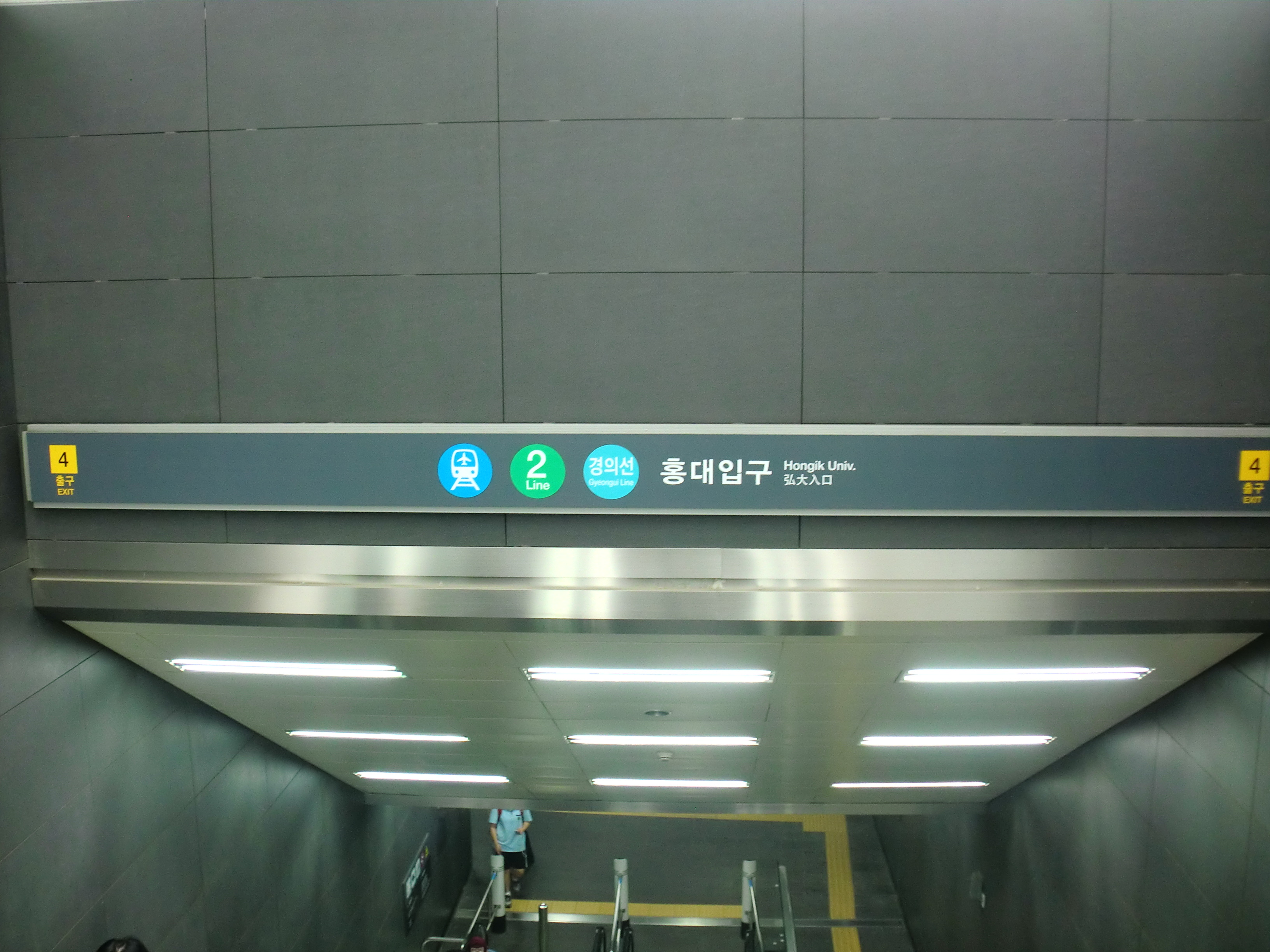 홍대입구역 4번출입구